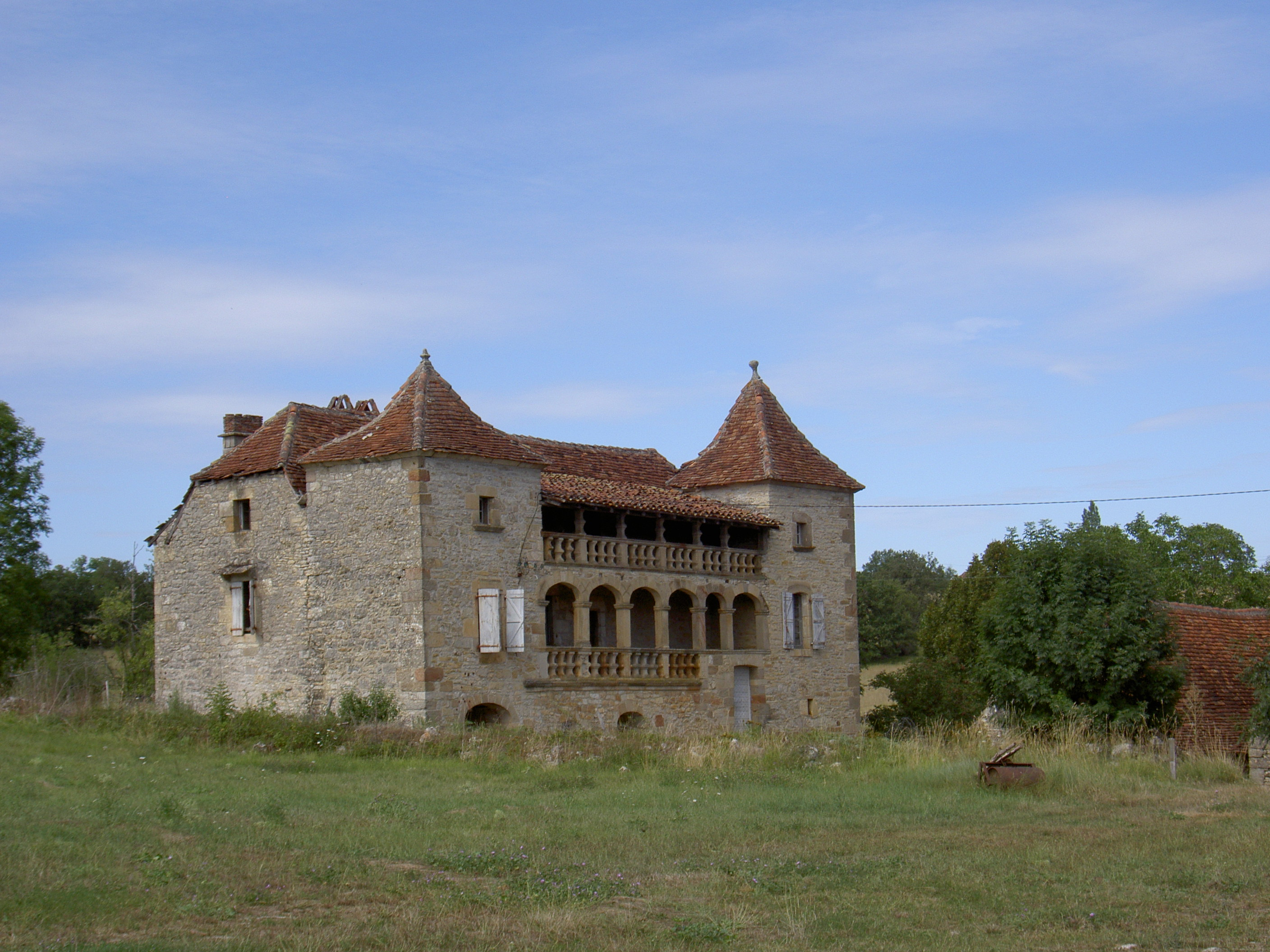 lieu dit Aubiguieres